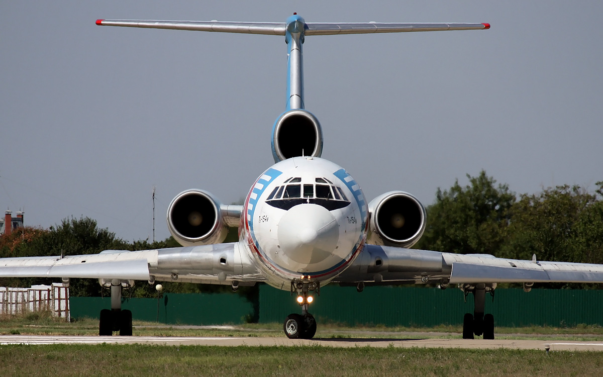 Tupolev Tu-154M "Ural Airlines"